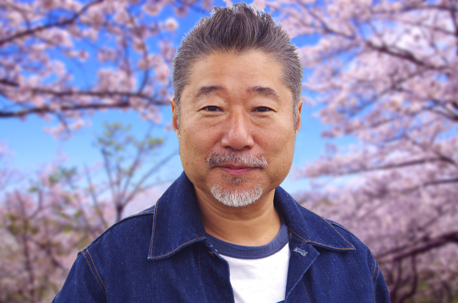 飯塚まもる